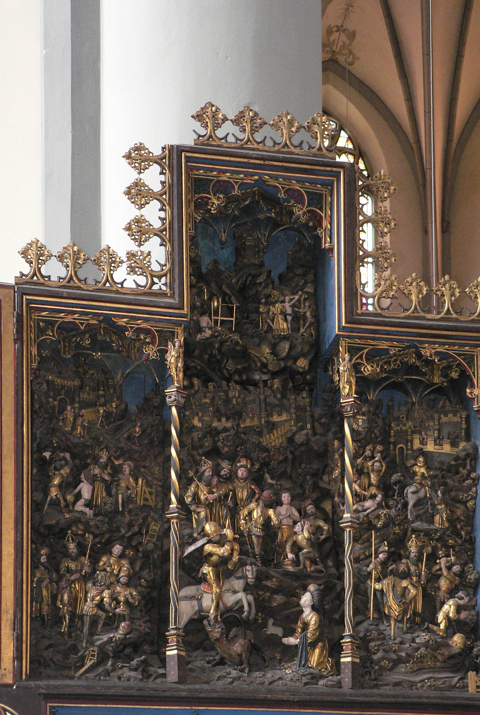 Mittelteil des Georgaltars von St. Nikolai, Kalkar